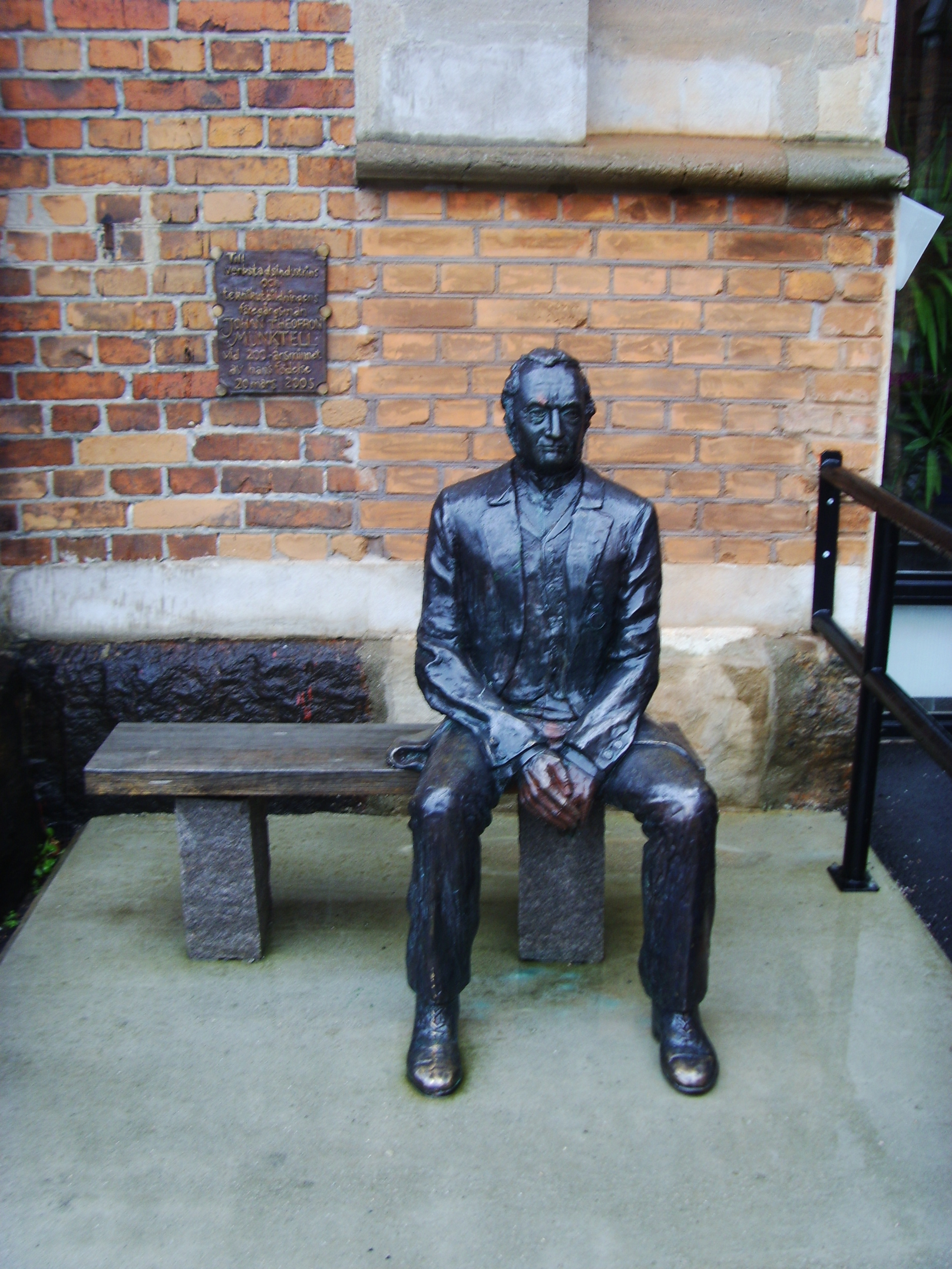 Johan Theofron Munktell född 20 mars 1805 i Kärrbo, Västmanland, död klockan 04.00 den 2 juli 1887 i Eskilstuna, svensk industriman och konstruktör. Staty utförd av Mats Lodén.